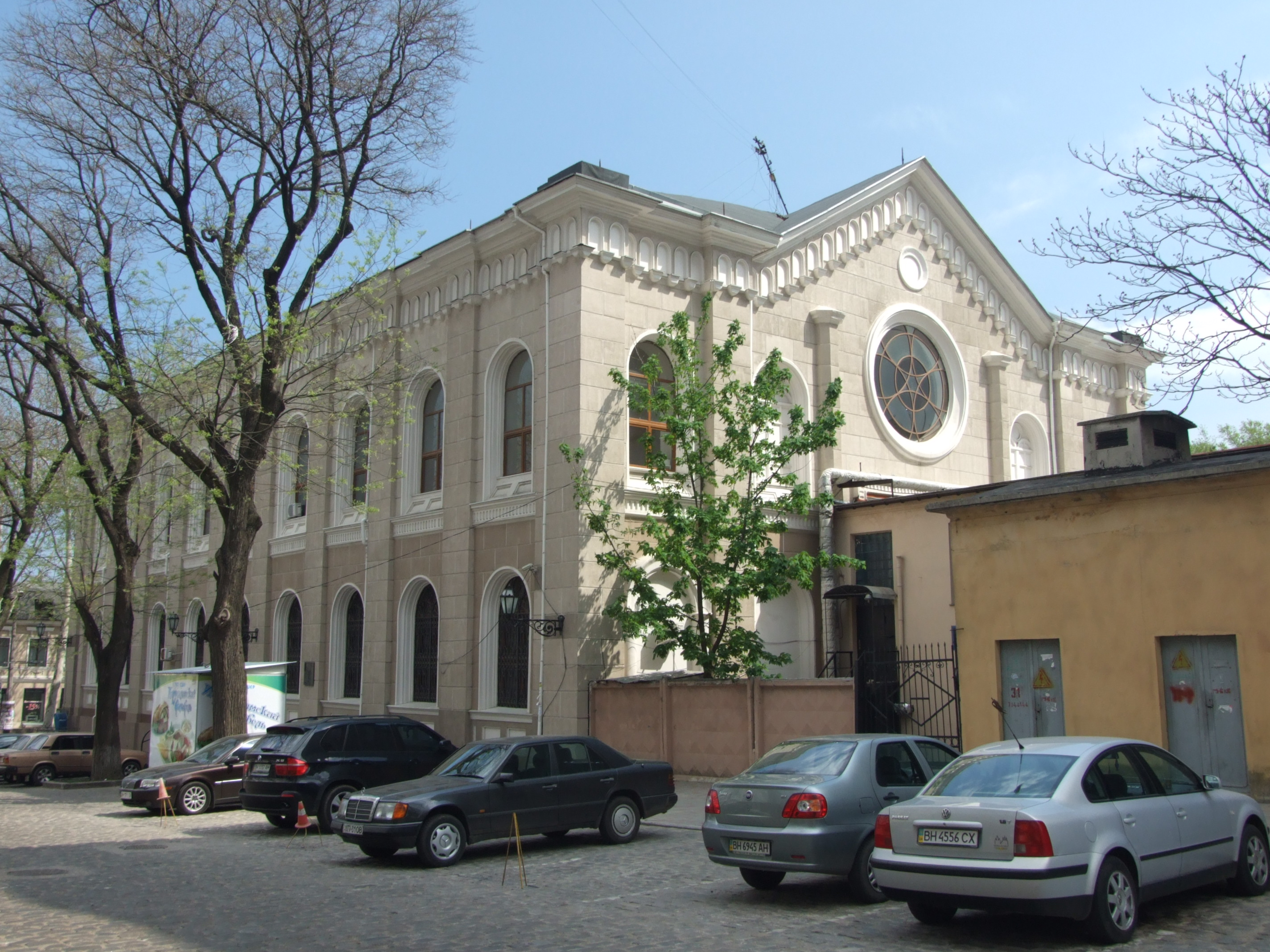 Будівля синагоги, 1846 рік, 1850 – 1853 роки